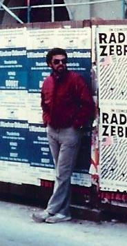 Don Wise, Germany 1984